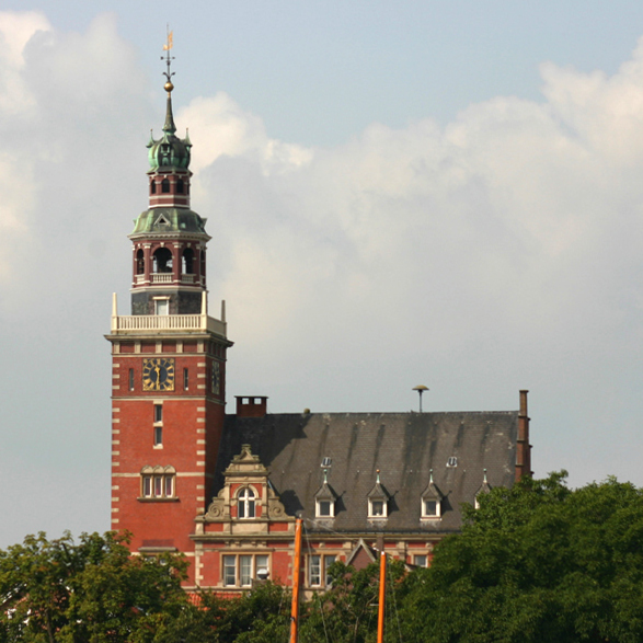 Rathaus der Stadt Leer (Ostfriesland)